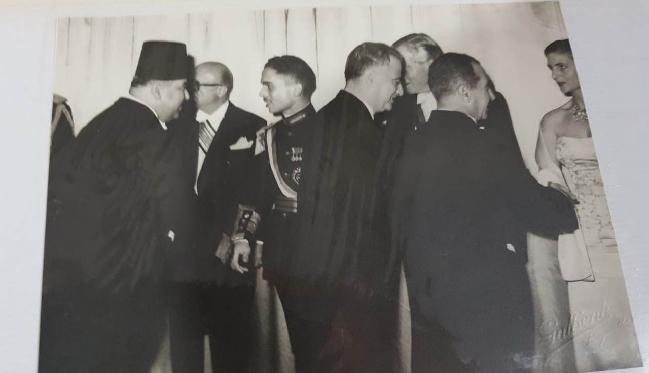 Boutors Khoury - roi Hussein de Jordanie